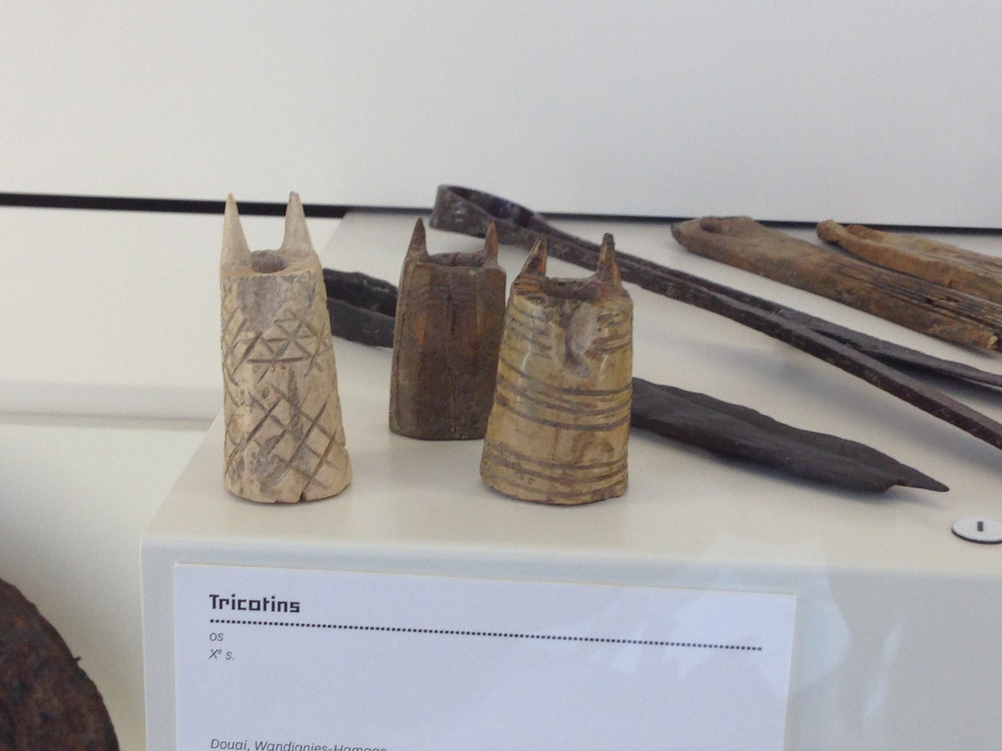 tricotins